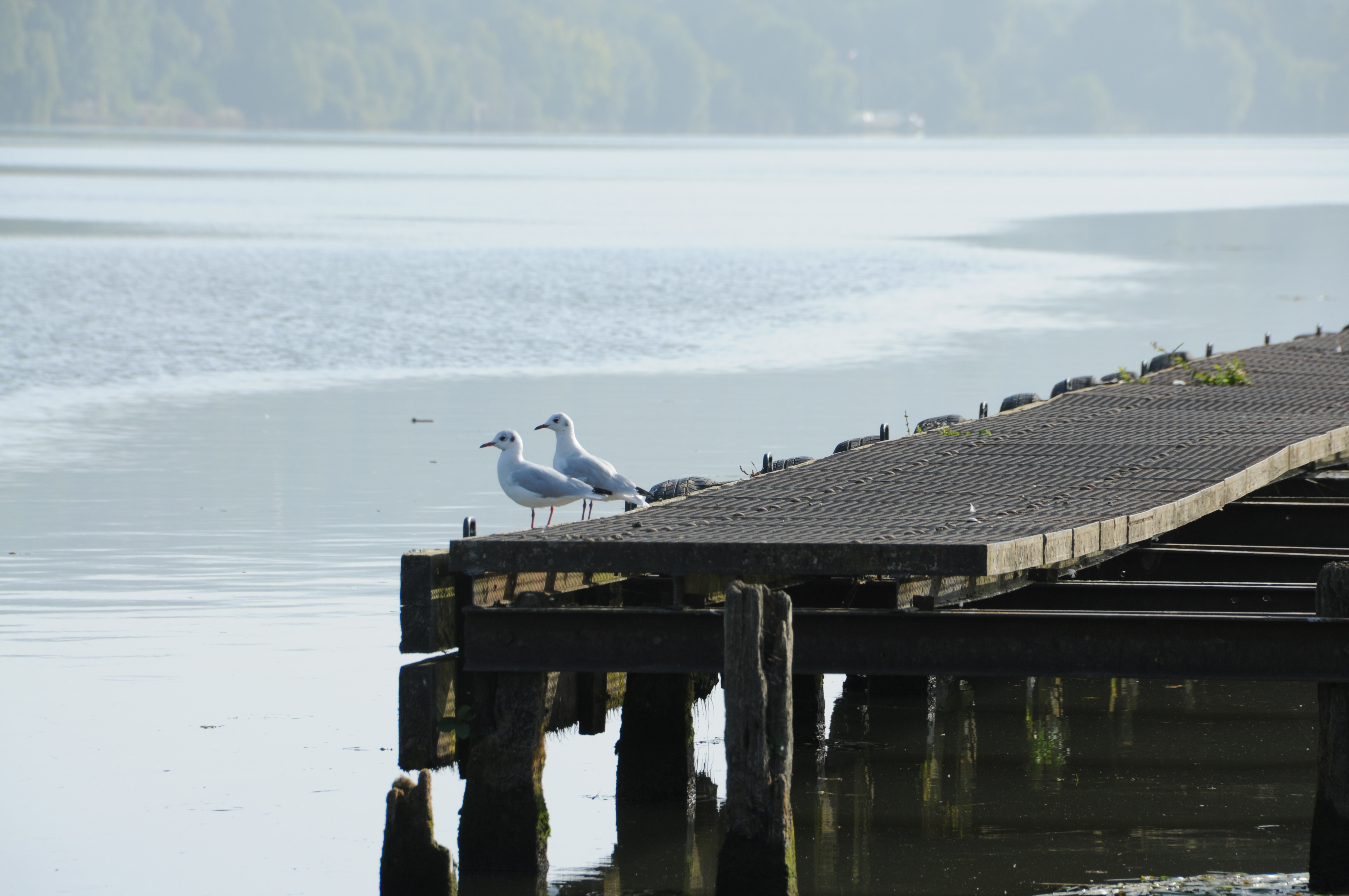 Voie verte Robert Arnaud des Mureaux (Yvelines)